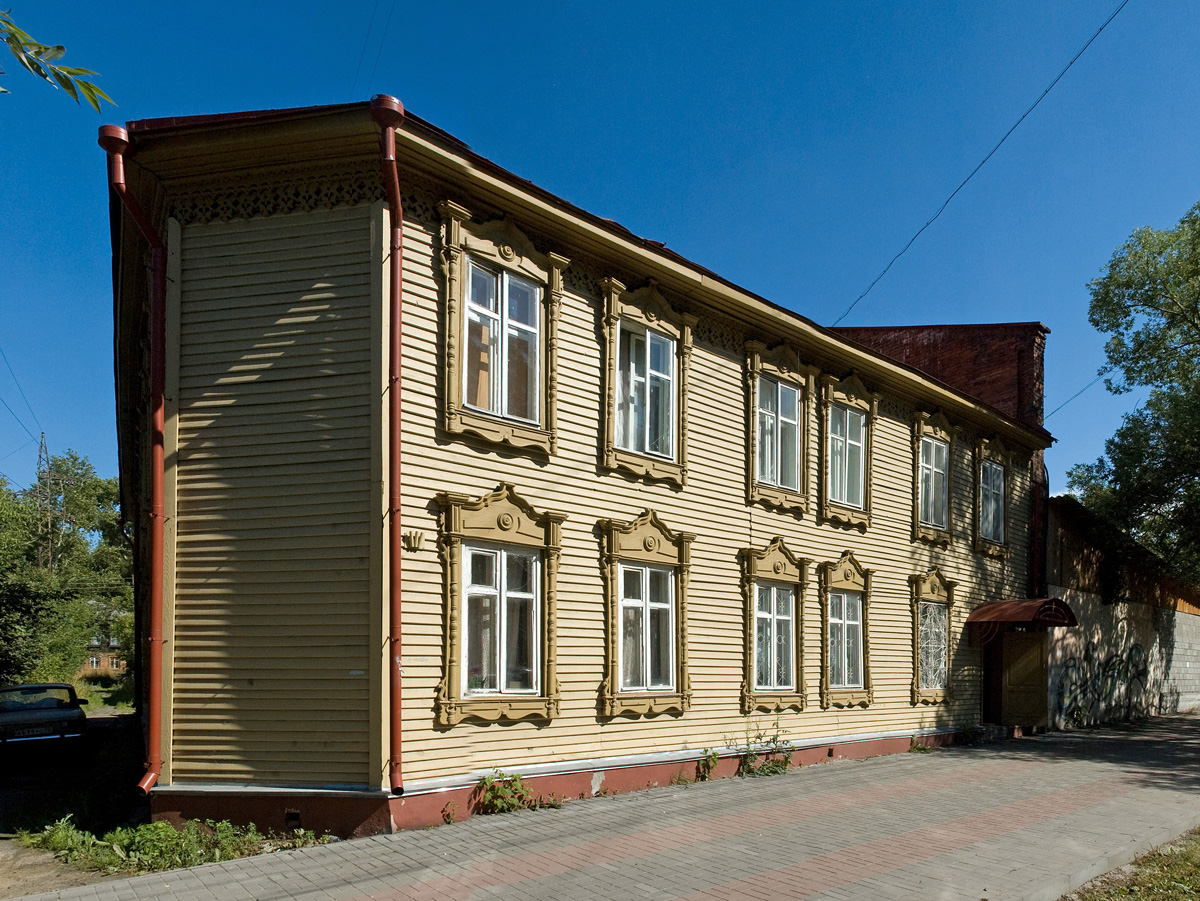 улица Беленца (Томск), д. 21